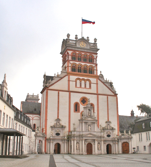 Basilika vun der Benediktinerabtei St. Matthias zu Tréier (Januar 2006)